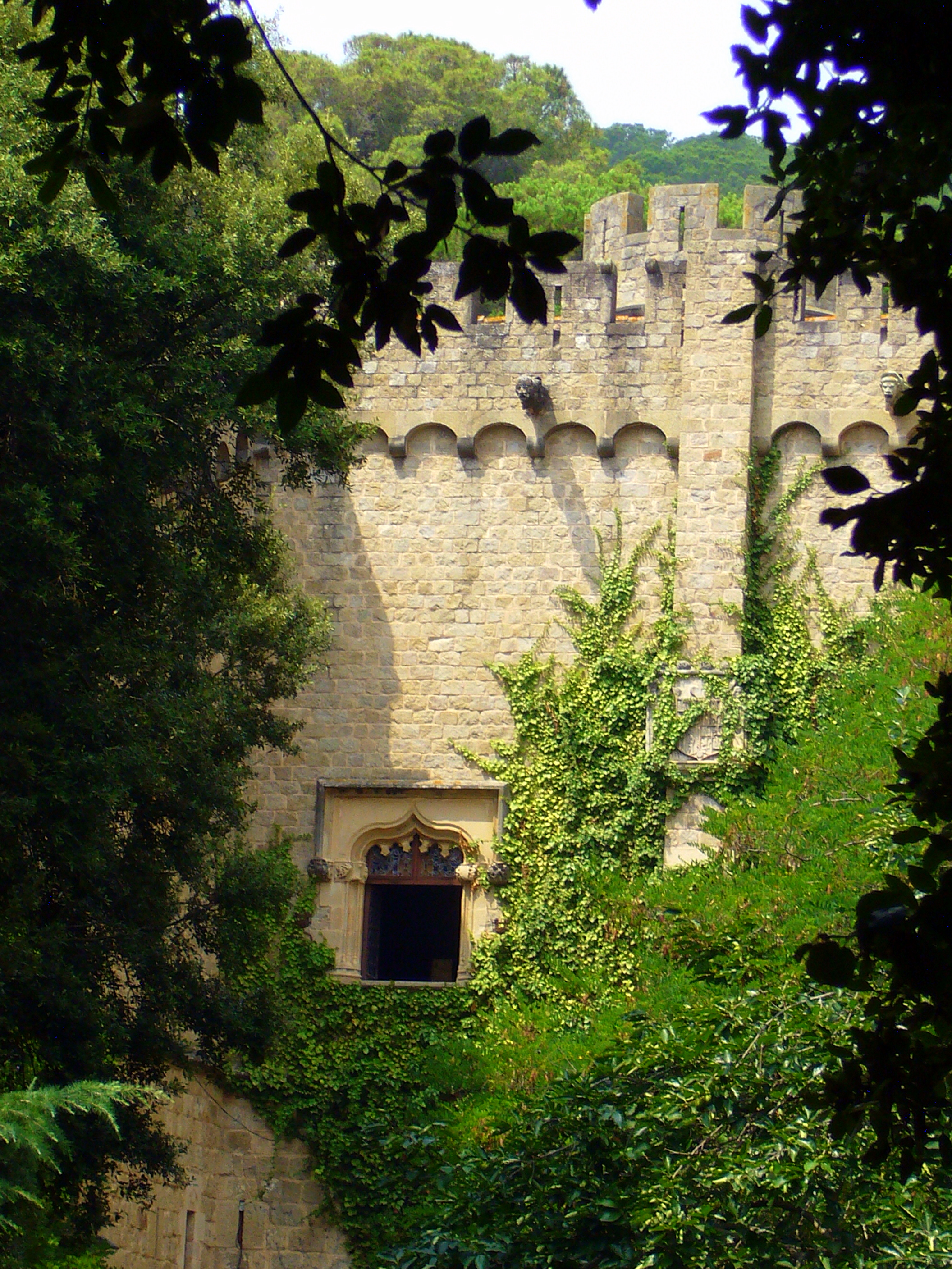 Castell de Santa Florentina (Canet de Mar-Maresme-Catalunya). Reformat per Lluís Domènech i Montaner (1885)